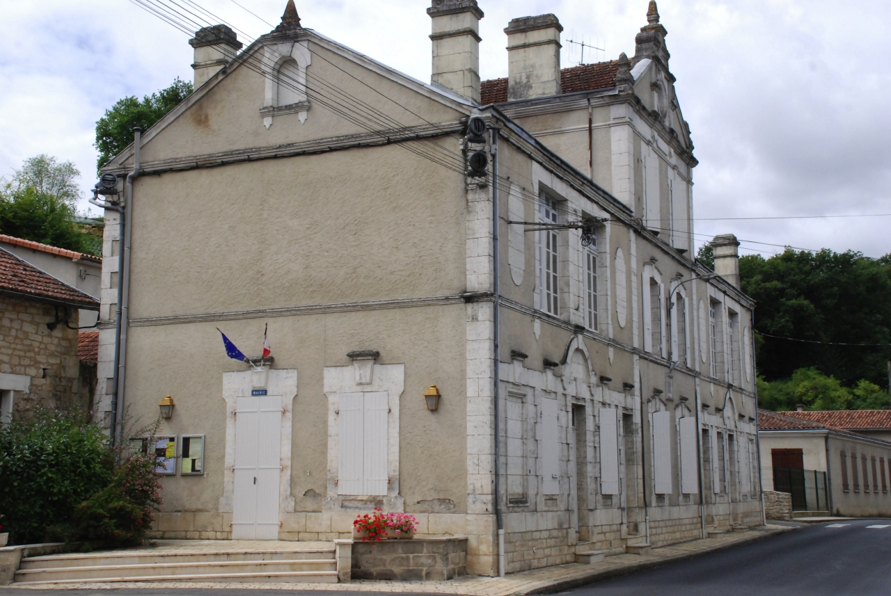 mairie de Cellefrouin